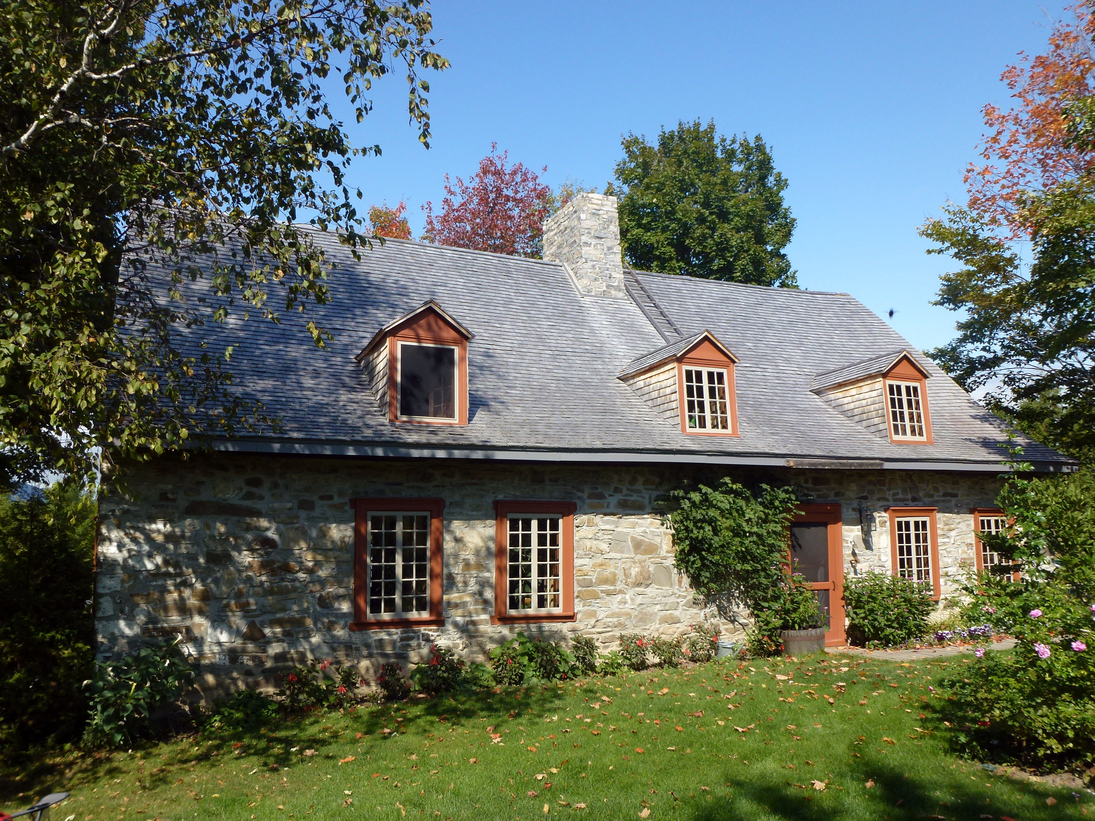 Maison Morisset, 4417, chemin Royal, Sainte-Famille (Canada). (Protection MH classé. Voir la liste des lieux patrimoniaux de la Capitale-Nationale pour plus de détails).